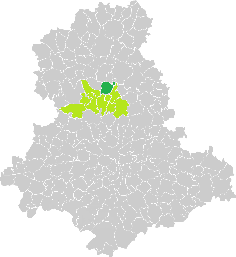 Carte de situation de la commune de Roussac (en vert foncé) dans le votre Canton (en vert clair) sur une carte des communes de la Haute-Vienne